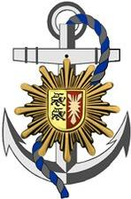 Polizei Schleswig-Holstein